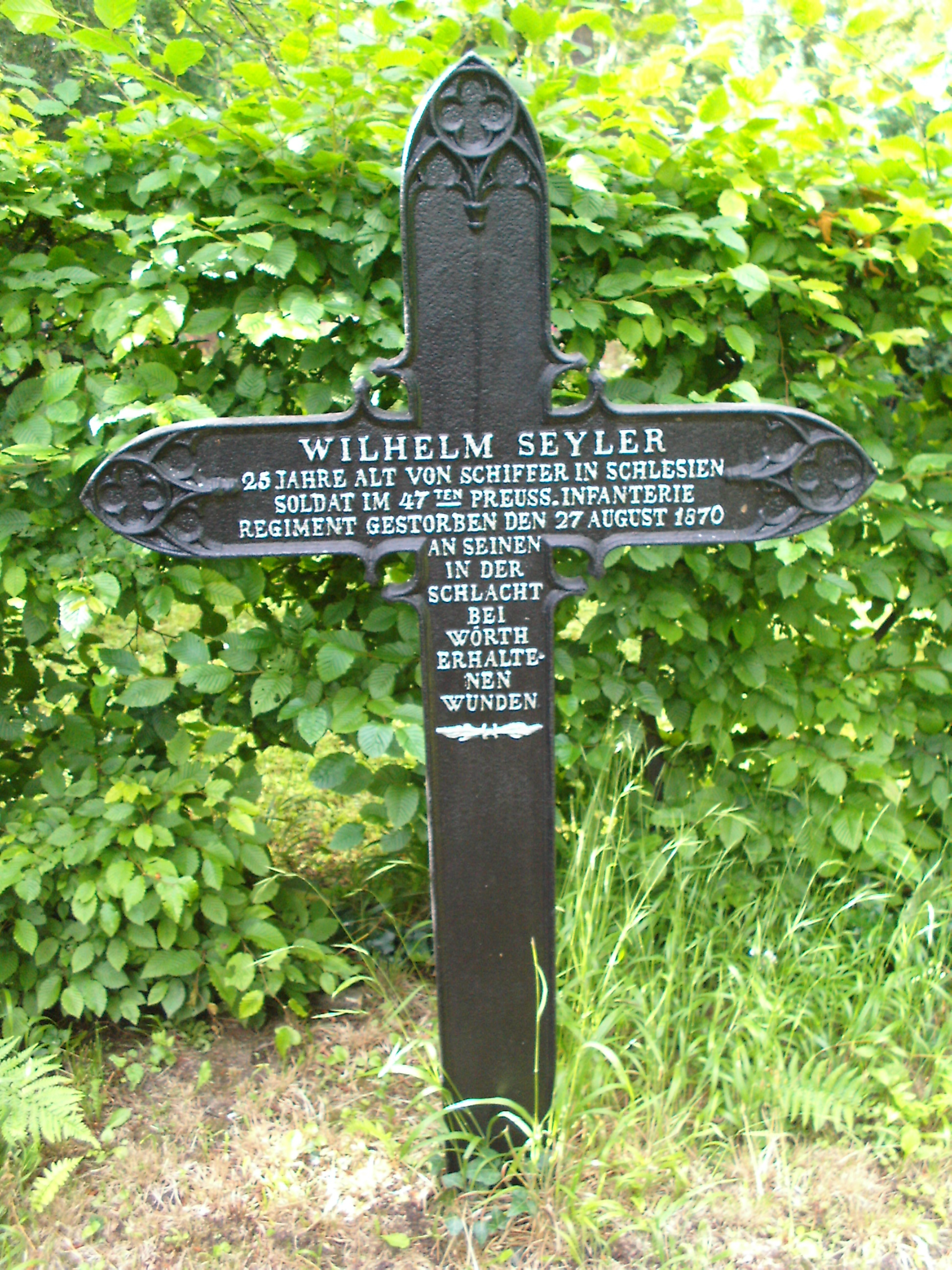 Hauptfriedhof Frankenthal Pfalz, Kreuz eines preussischen Soldaten, der dort 1870, im Lazarett, an seinen Wunden aus der Schlacht bei Wörth starb.